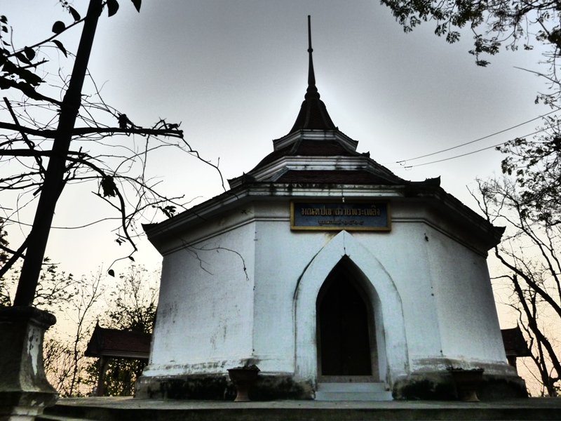 พระแท่นดงรัง